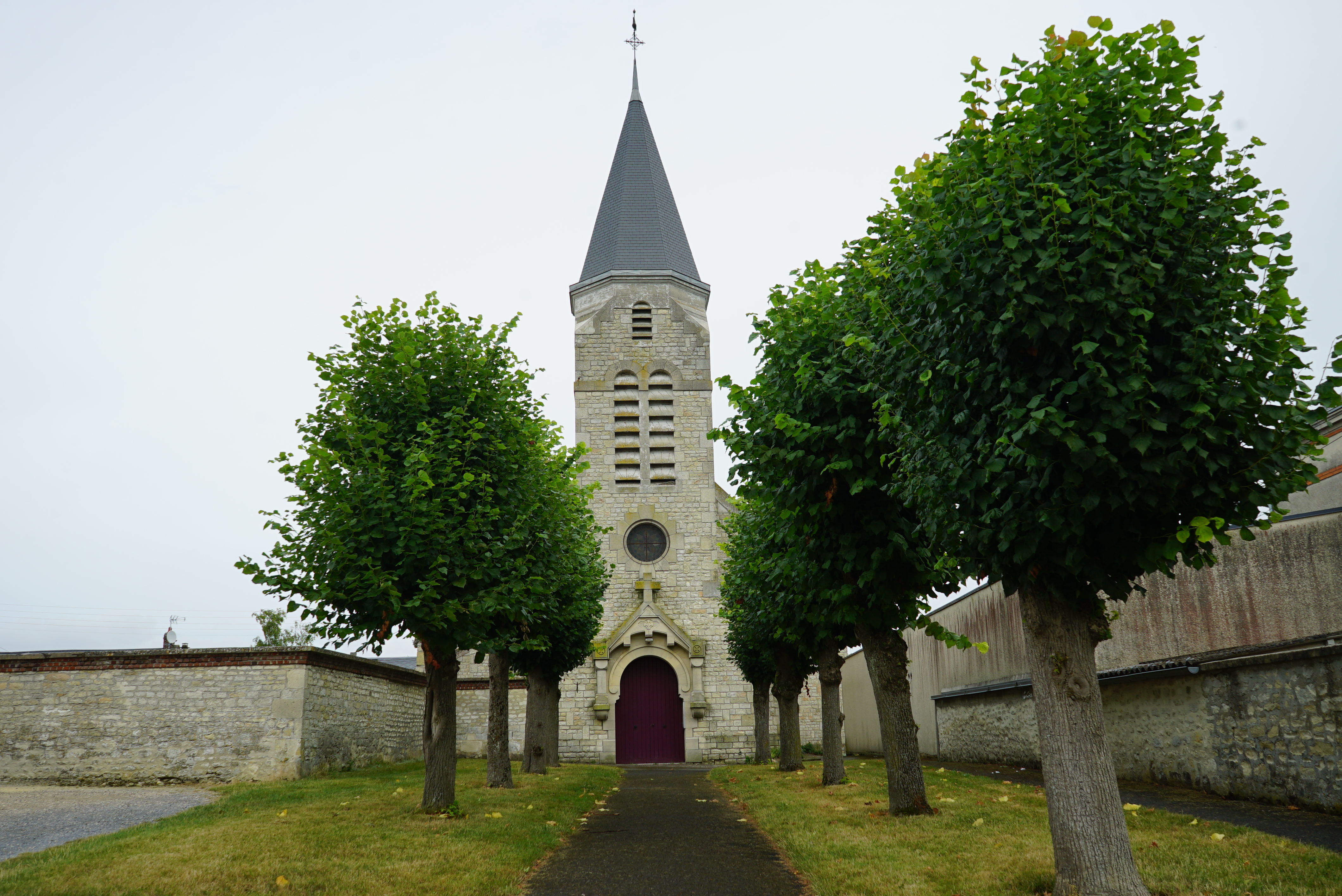 l'église paroissiale.